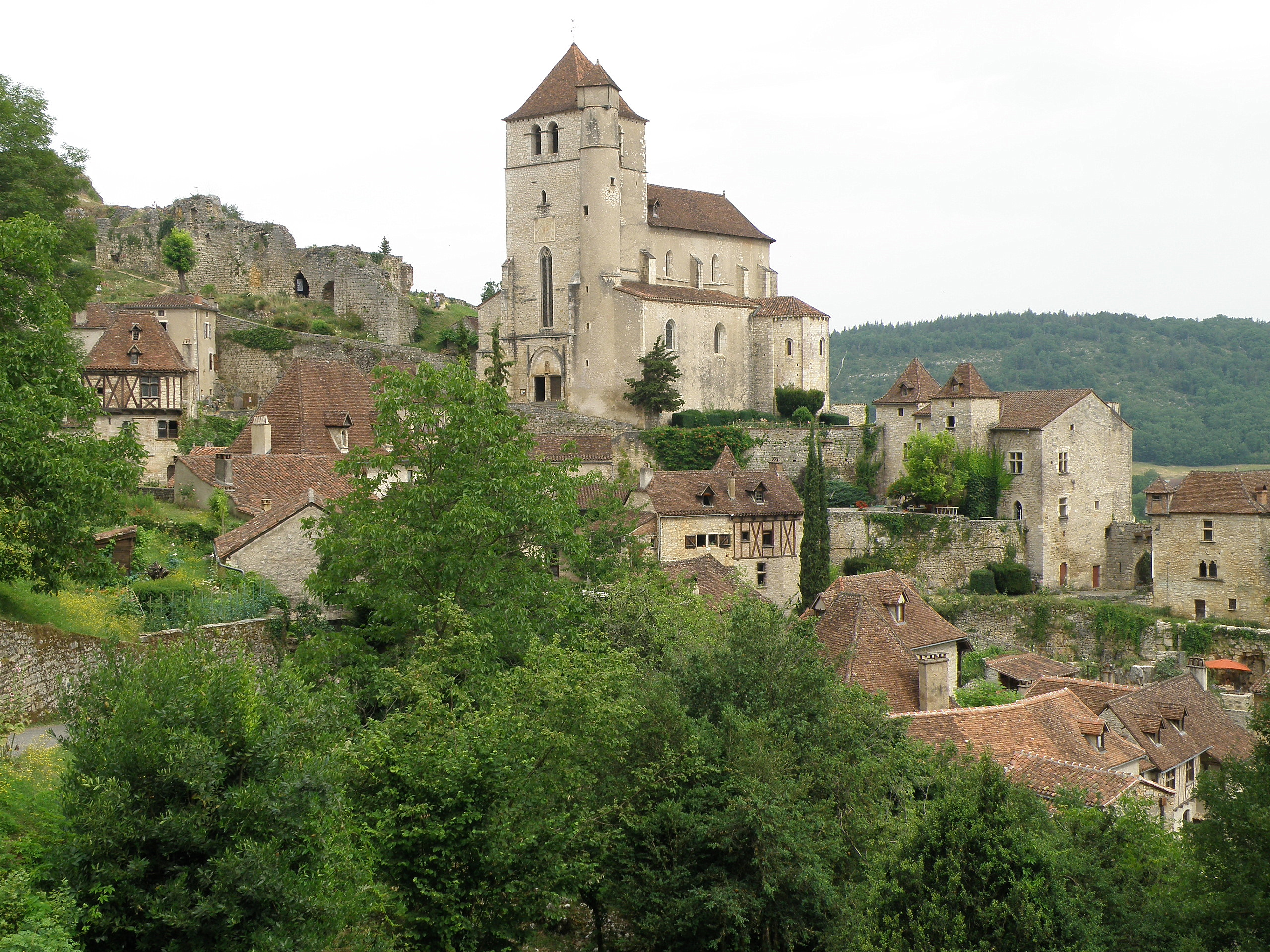 Saint-Cirq-Lapopie (Lot, France). Vue générale du bourg.